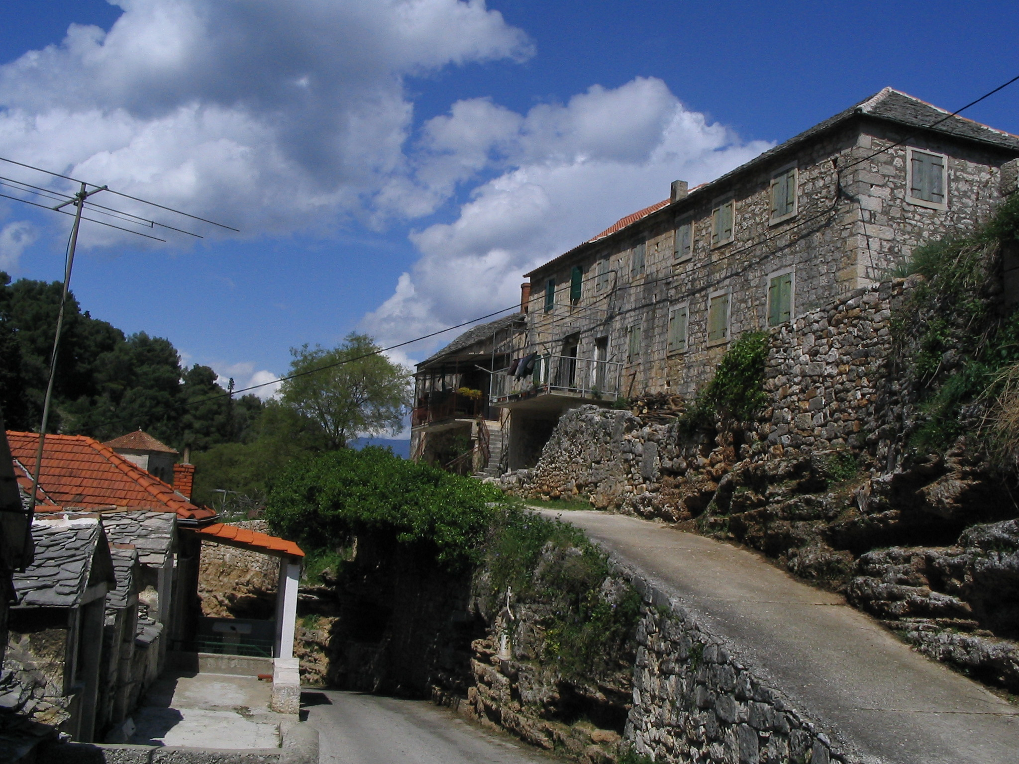 Dol, Brač, Croatia